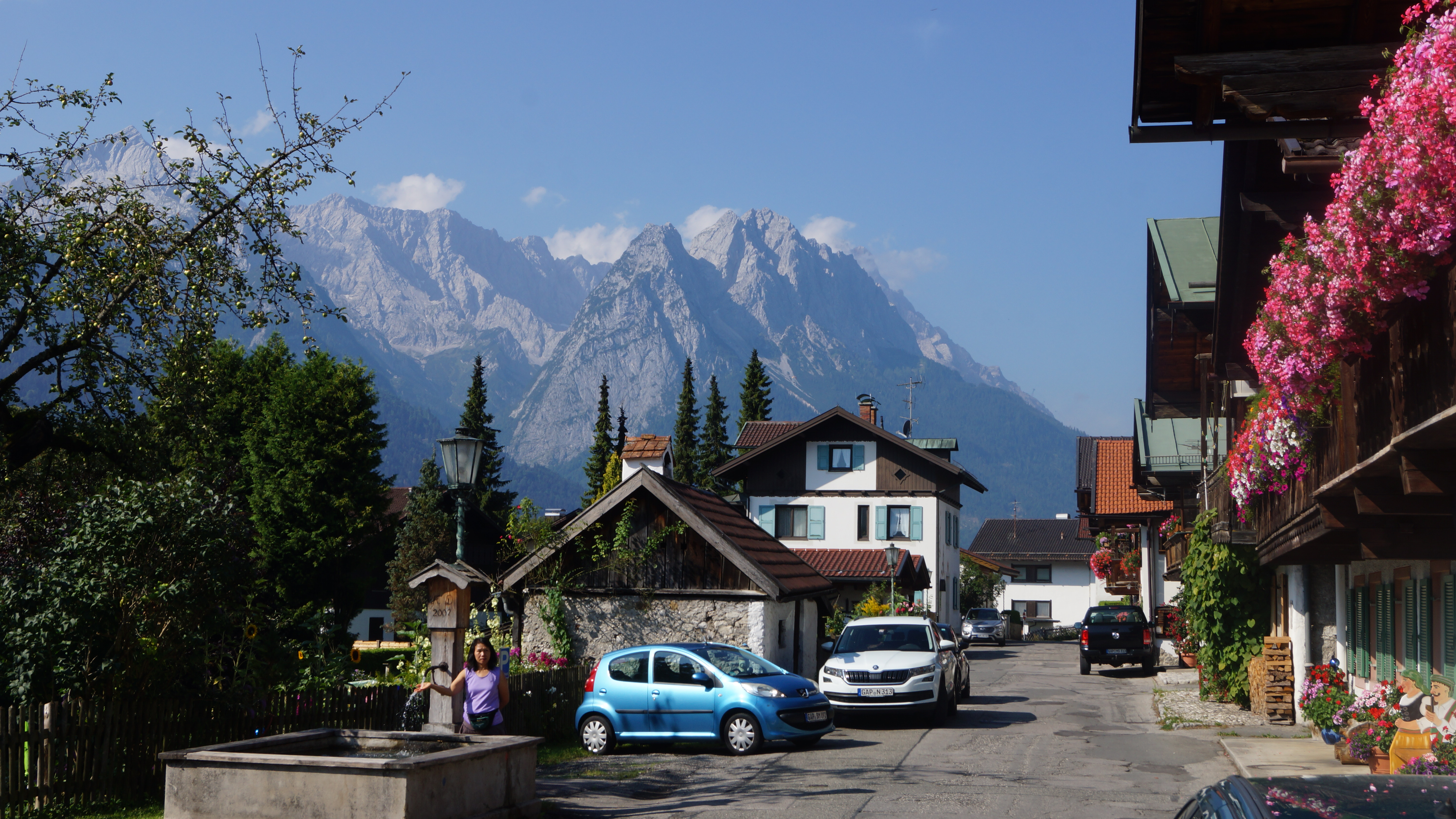 Germany Bavaria Landkreis GAP Garmisch-Partenkirchen - 698 m ü. NHN